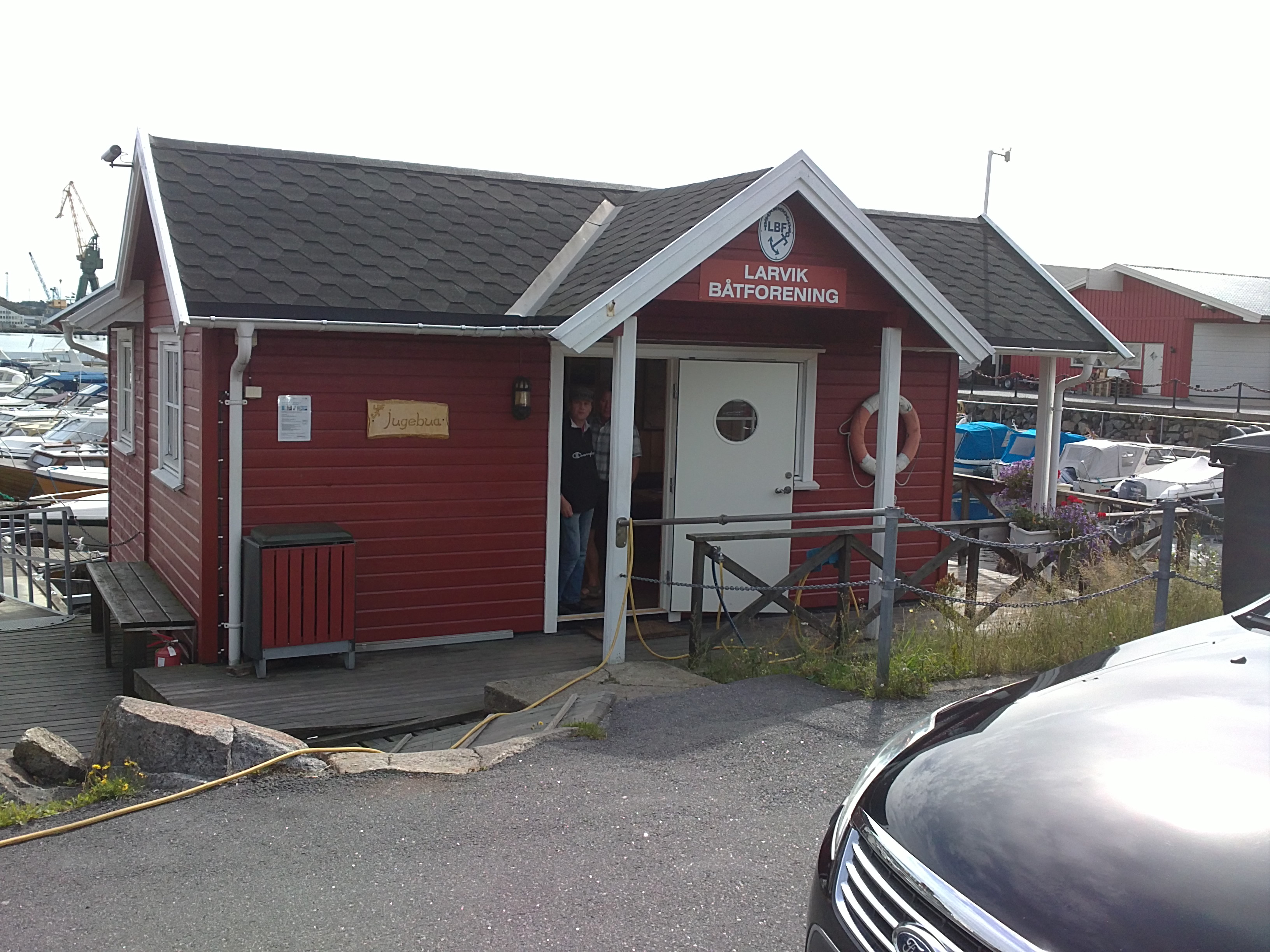 Bilde av "Jugerbua" på Karistranda, Torstrand